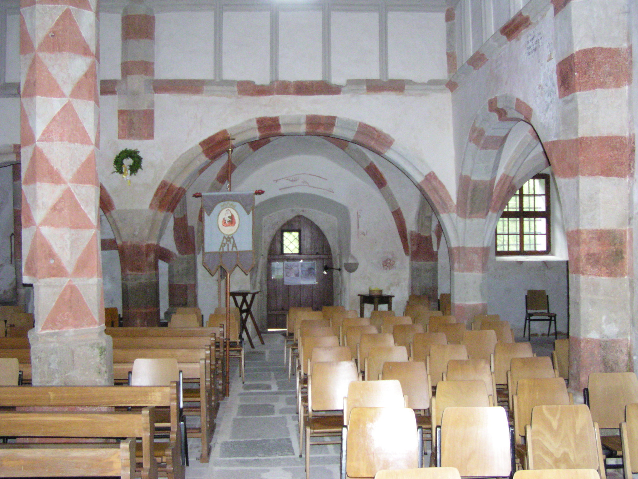 podzim 2011